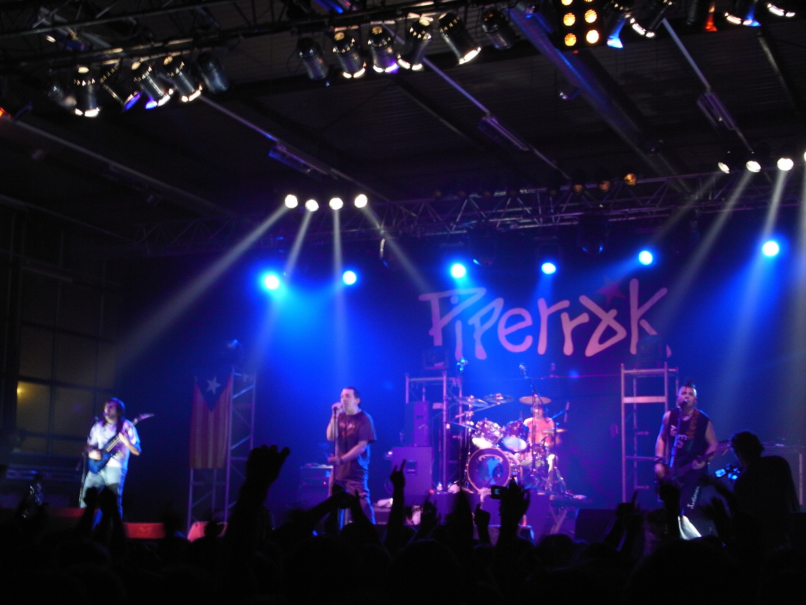 Concierto Final de la Gira de Piperrak en Durango